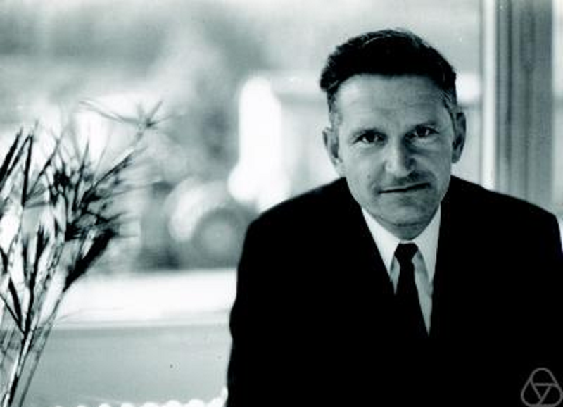 Dietrich Morgenstern im Mathematischen Forschungsinstitut Oberwolfach